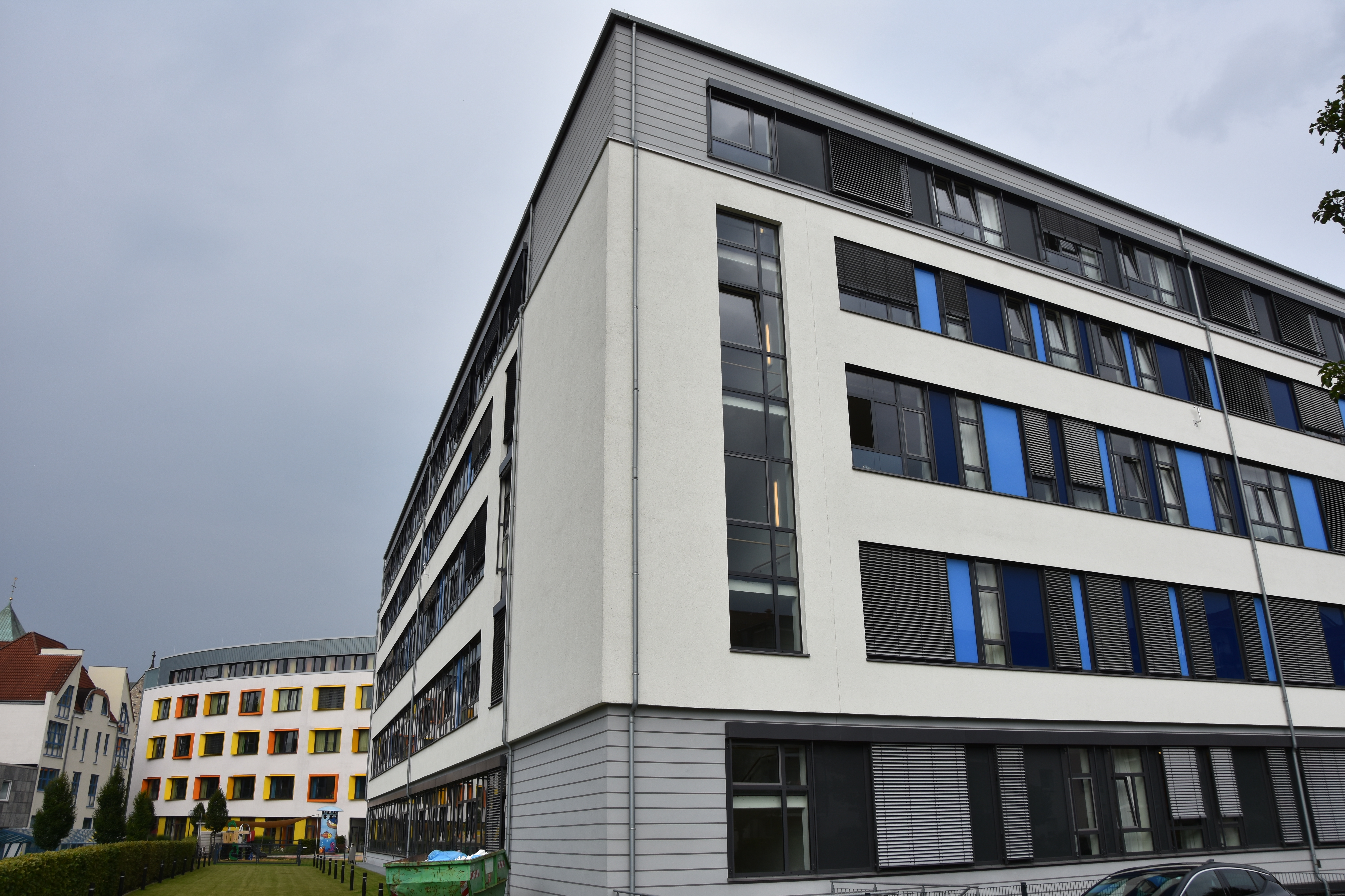 Haus M des Marienhospitals Osnabrück (im Vordergrund), Christliches Kinderhospital Osnabrück (im Hintergrund)